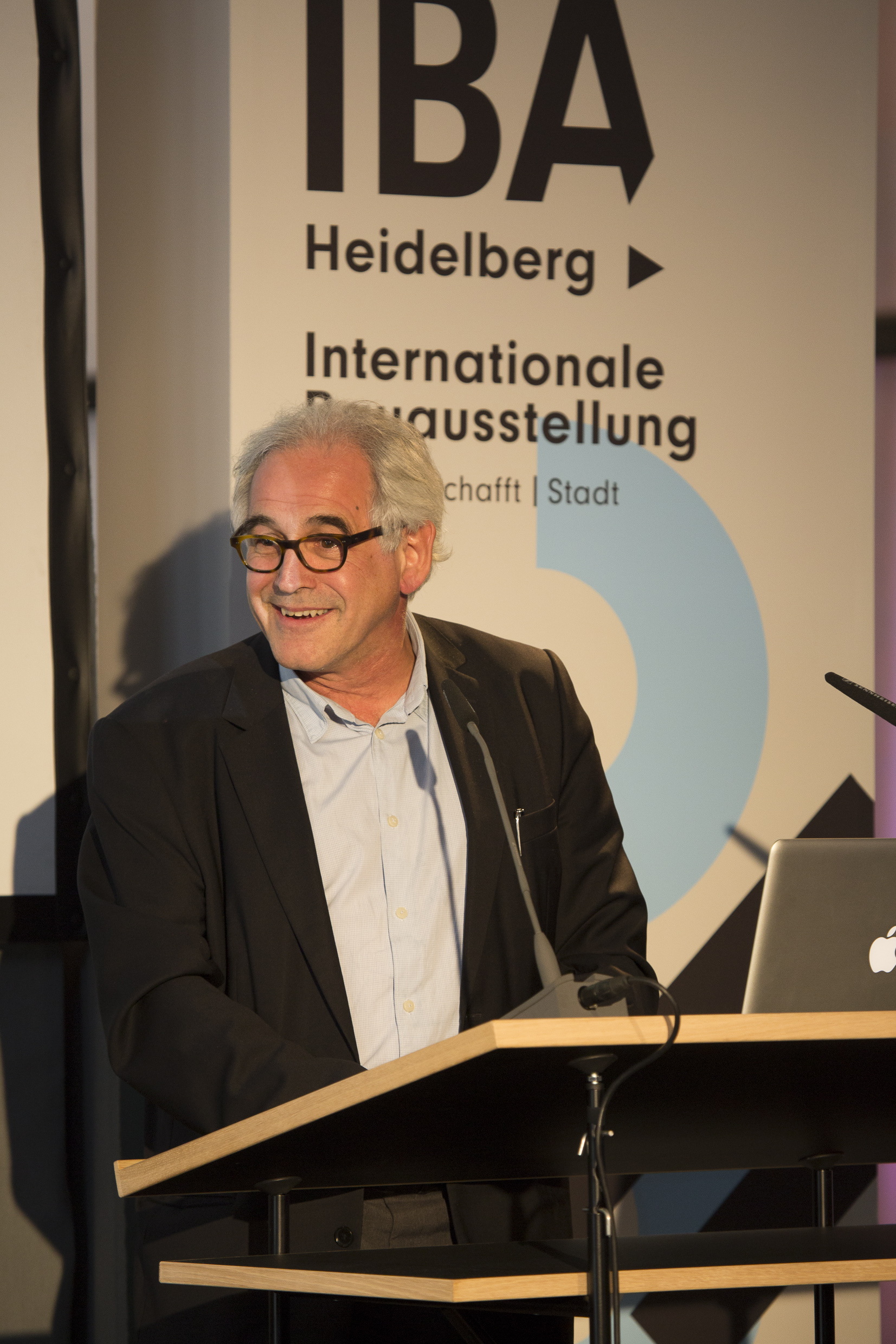 Michael Braum beim IBA LAB No. 1